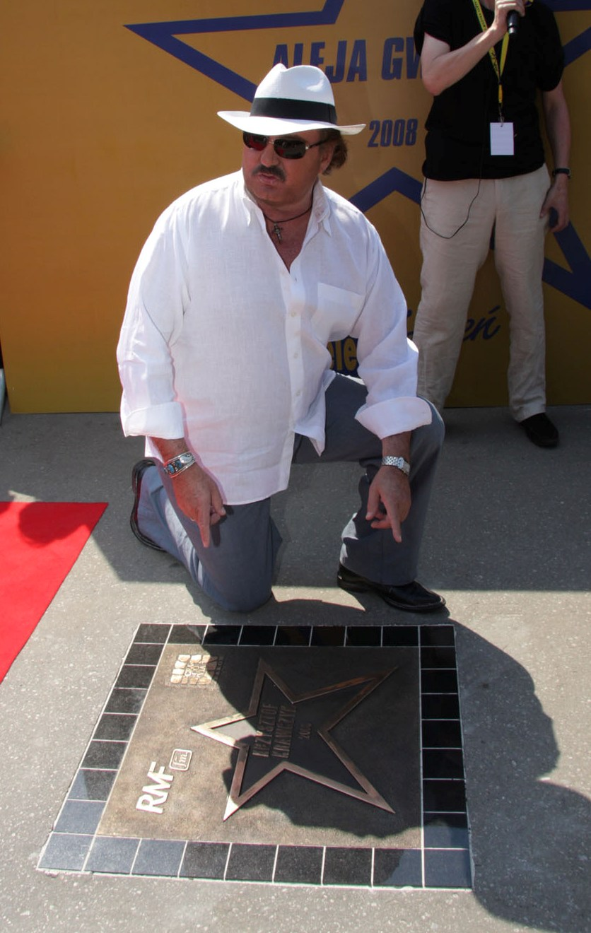 Muzyczna Aleja Gwiazd - K. Krawczyk